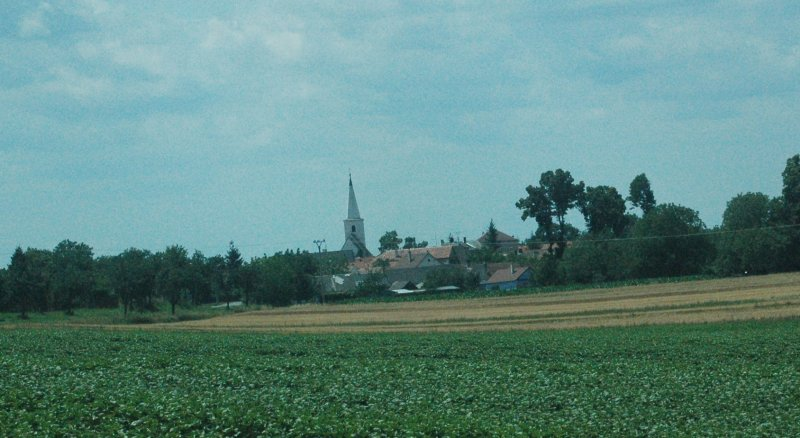 Plavecký Peter